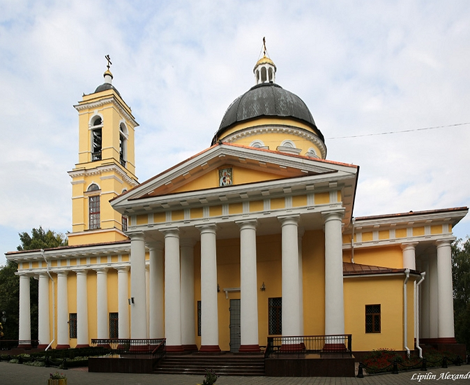 Гомельскі палацава-паркавы комплекс. Бакавы фасад сабора